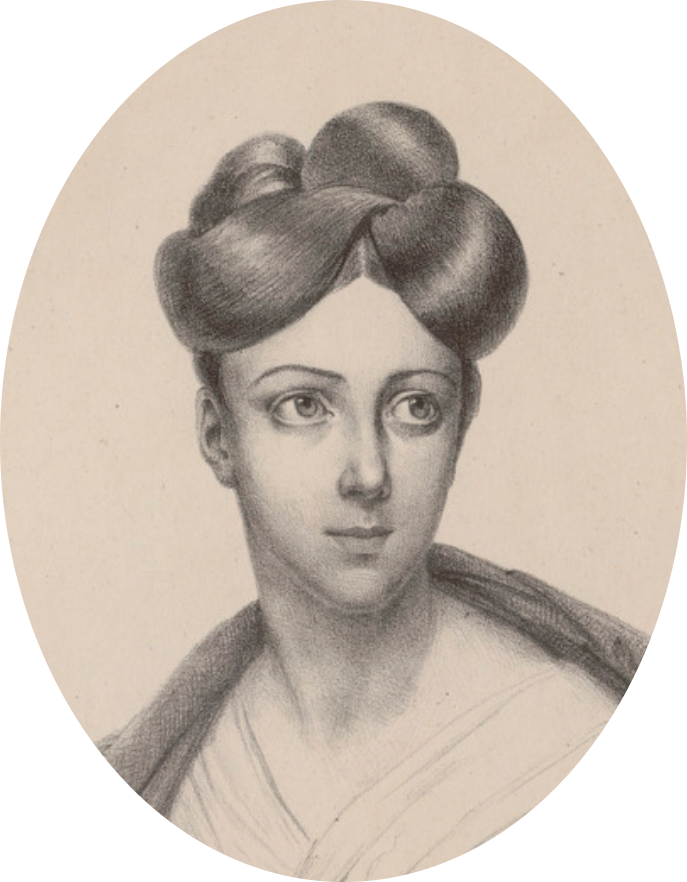 portrait